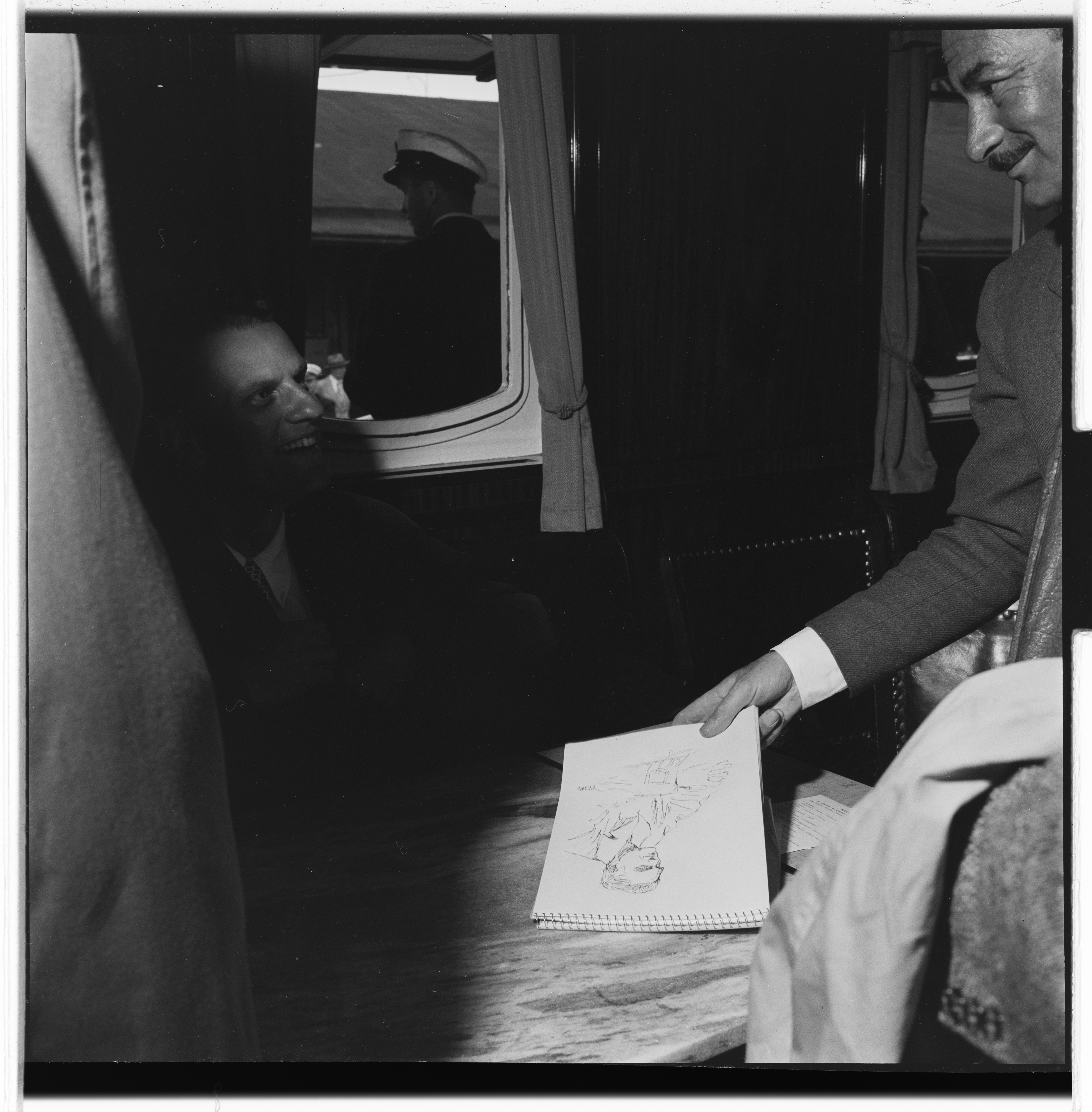 Bildet er hentet fra Arkivverket. Billy Graham Arkivinstitusjon : Riksarkivet Arkivnavn : Billedbladet NÅ Sted : Norge, Oslo, Oslo, Emneord: kristendom, forkynnelse, møter Avbildet: Graham, Billy